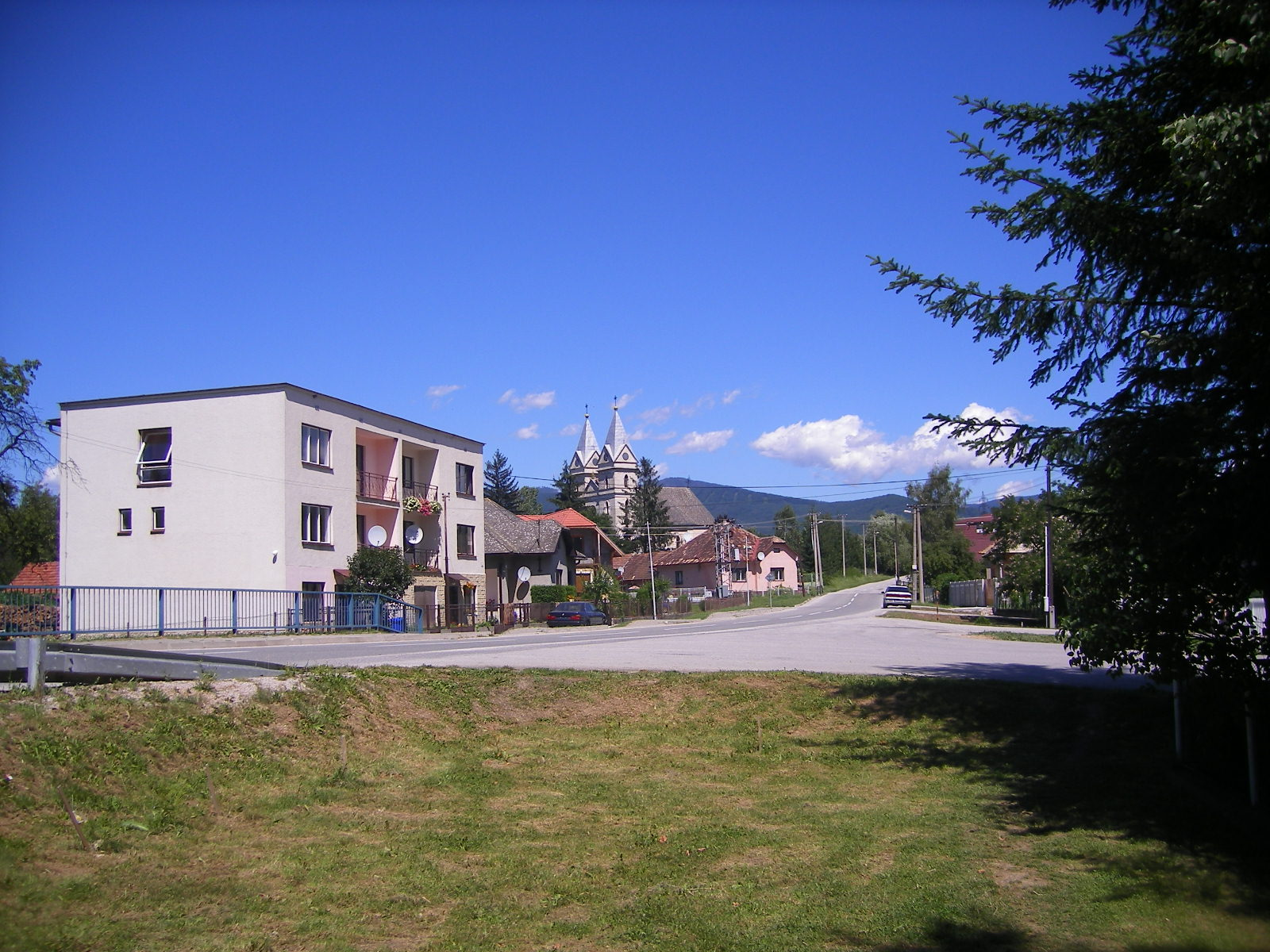 Várhosszúrét